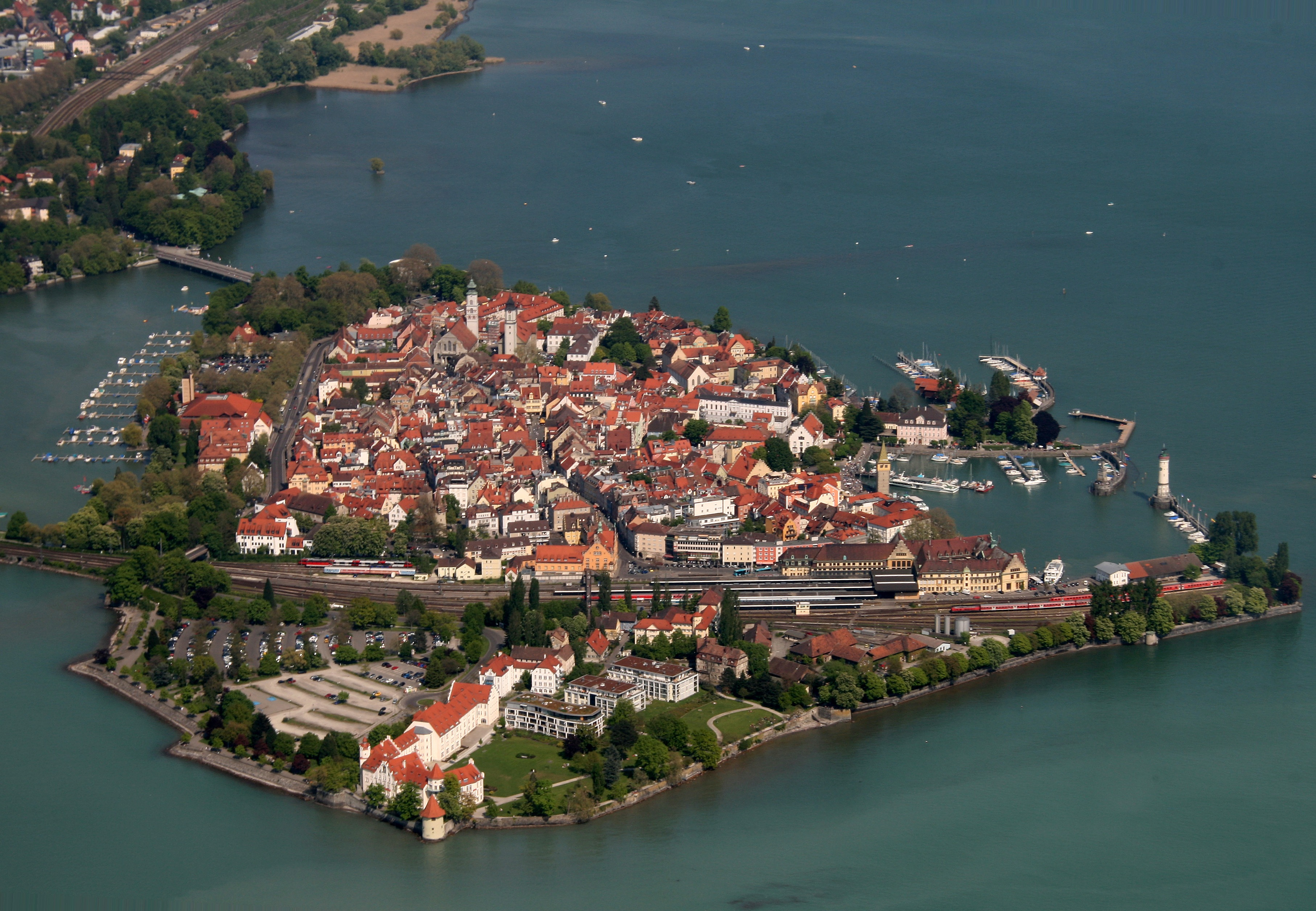 Lindau Insel am Bodensee, aufgenommen während eines Fluges mit einer Propellermaschine des Types: D-EJCR Robin DR400-180R.